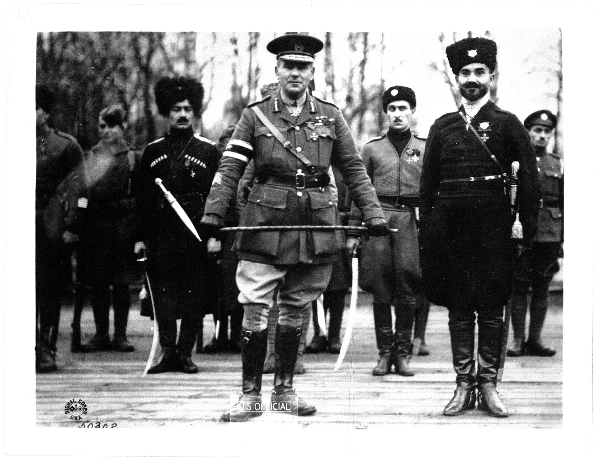 El general británico Frederick C. Poole, al mando de las tropas Aliadas en Arjángelsk hasta octubre de 1918, junto a unos cosacos. Más tarde destinado con el Ejército Blanco en el sur de Rusia.